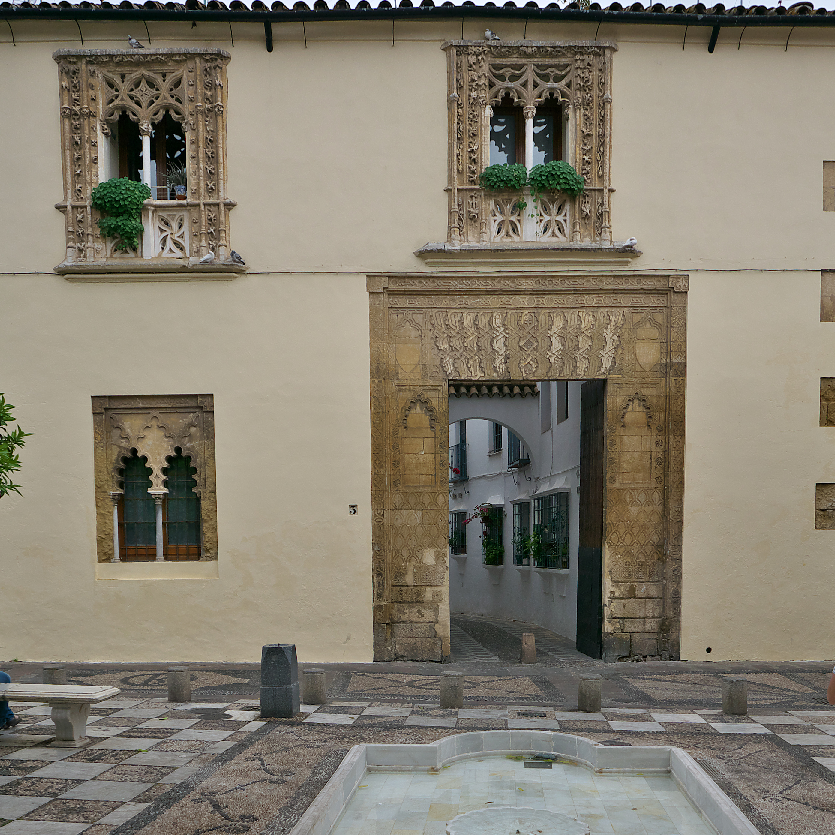 Casa gótico-mudéjar (ca 1510). Uno de sus propietarios fue importante dirigente en América. También es conocida por de los Cea, conquistador de Córdoba.